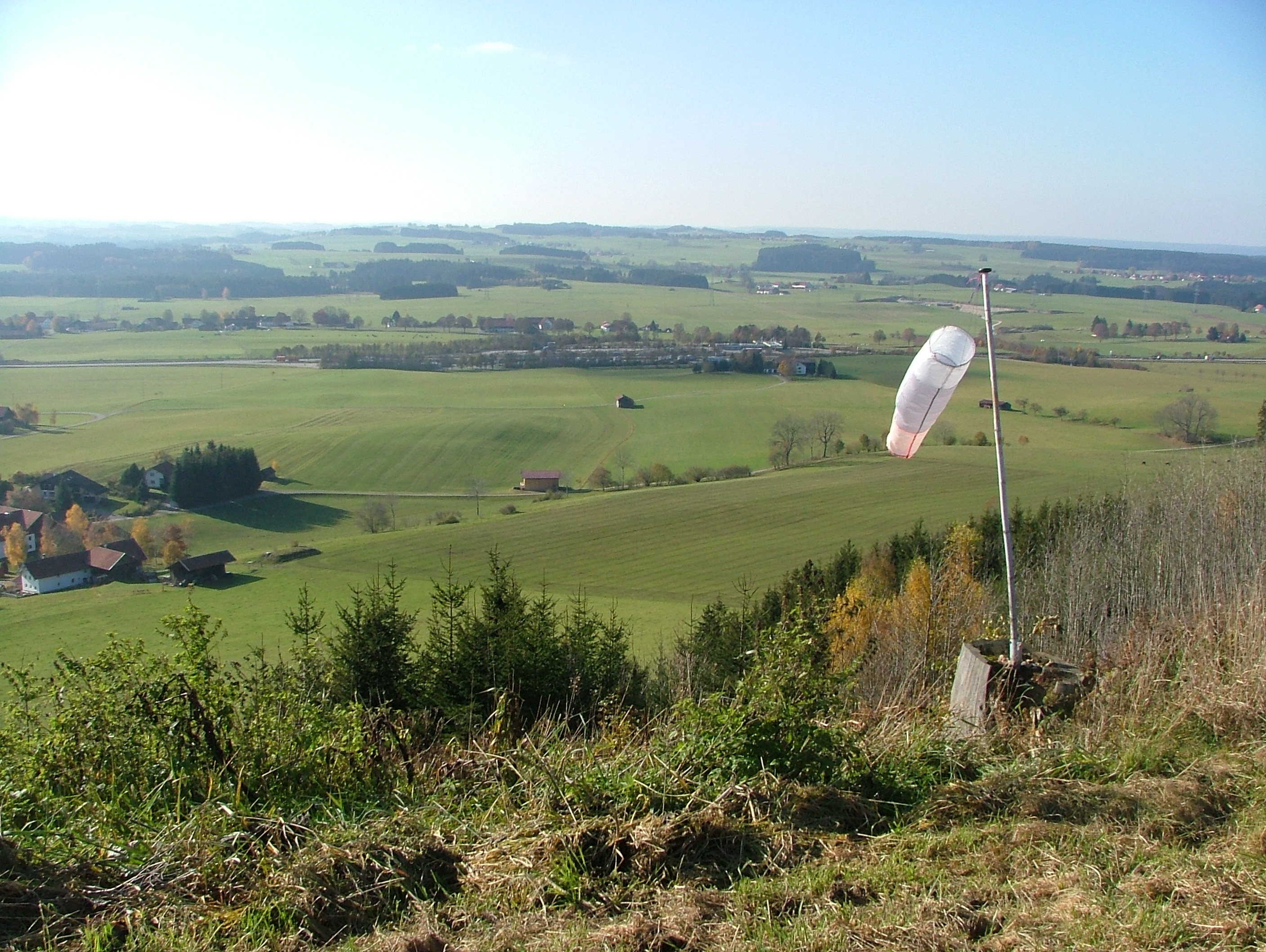 Start und Ziel für Gleitschirmflieger, im Tal die Raststätte Allgäuer Tor